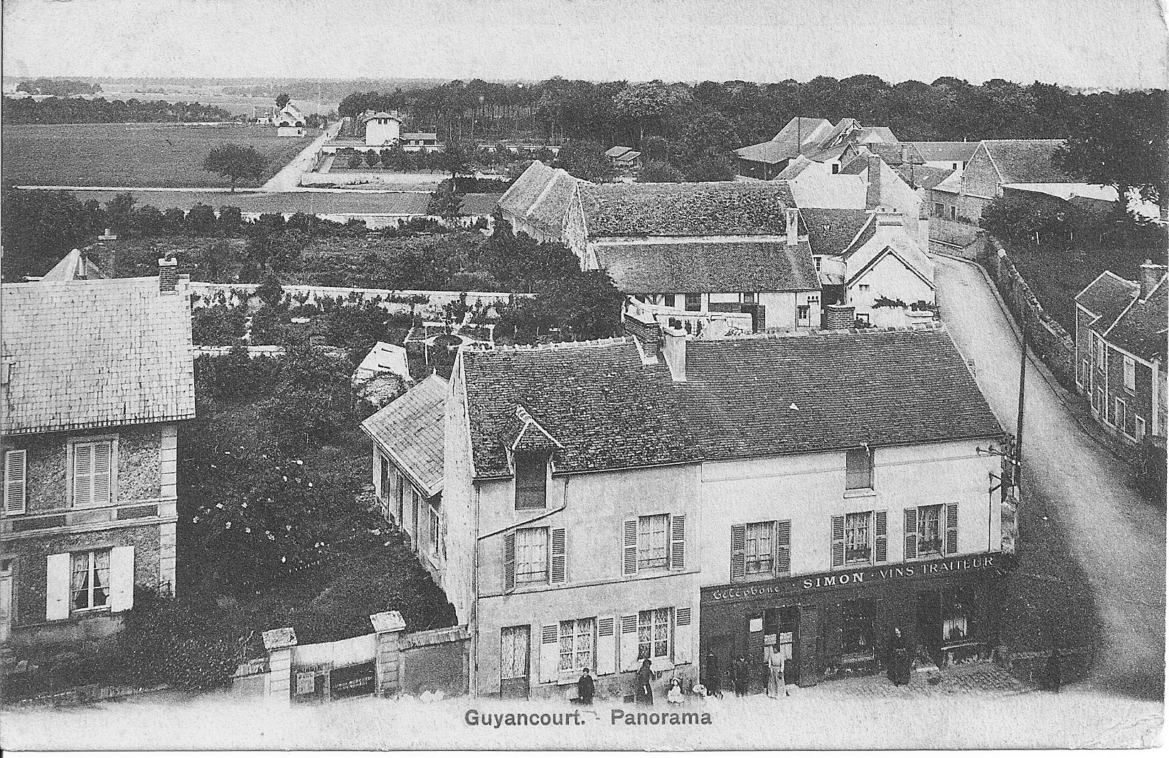 Guyancourt, photo depuis le clocher avant 1918